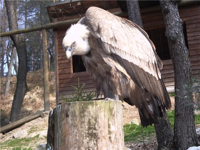 Slika prikazuje beloglavega jastreba ter njegov strašen poglad, kar sem poimenoval kar "smrtonosen pogled". Slikal sem ga, ko smo nekega dne z družino šli v ZOO Ljubljana.